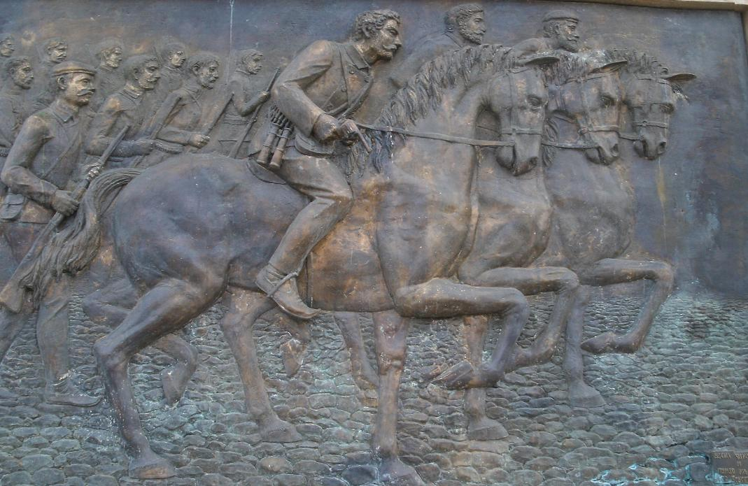 Васил_Чакаларов_и_Пандо_Кљашев_со_соборците